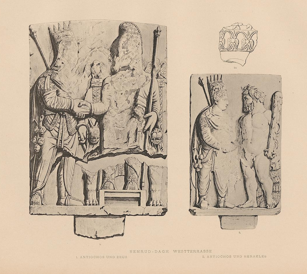 Rekonstruktion der Dexiosisreliefs von Antiochos mit Zeus und Herakles auf der Westterrasse am Nemrut Dağı, Türkei, von Carl Humann und Otto Puchstein, 1890.